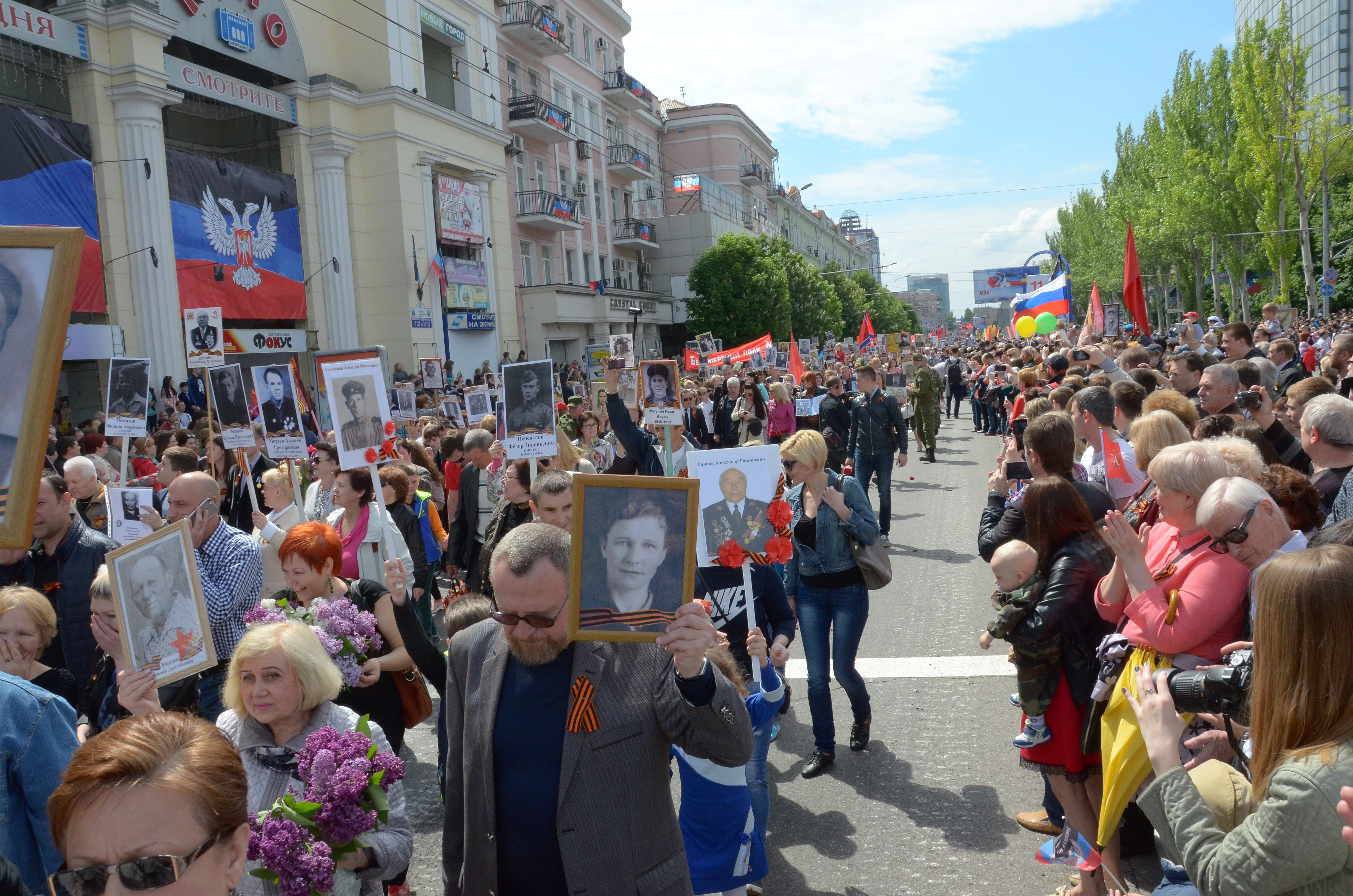 День Победы в Донецке